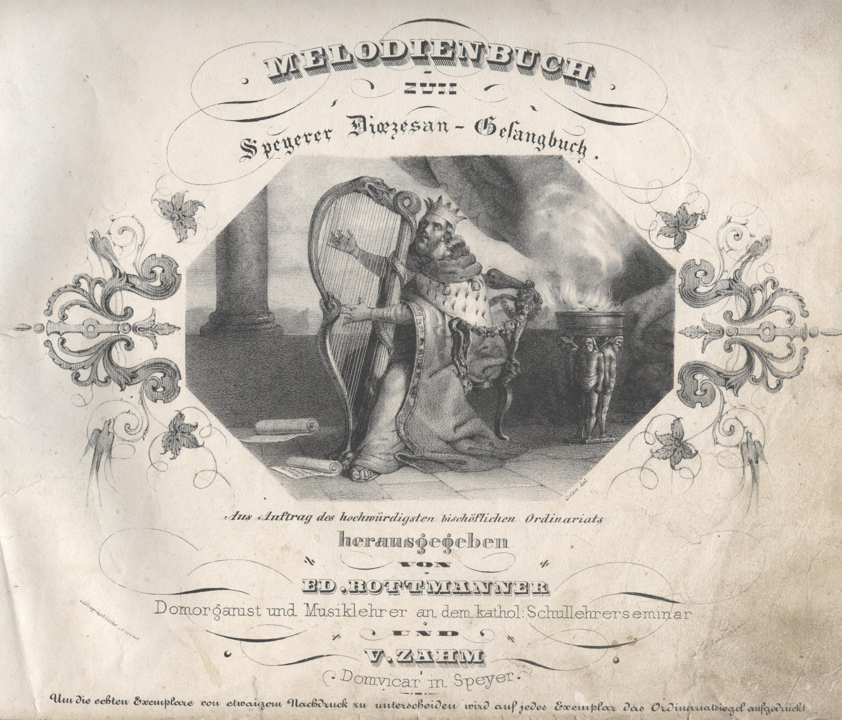 Eduard Rottmanner, Komponist, Speyer, Orgelbuch 1842